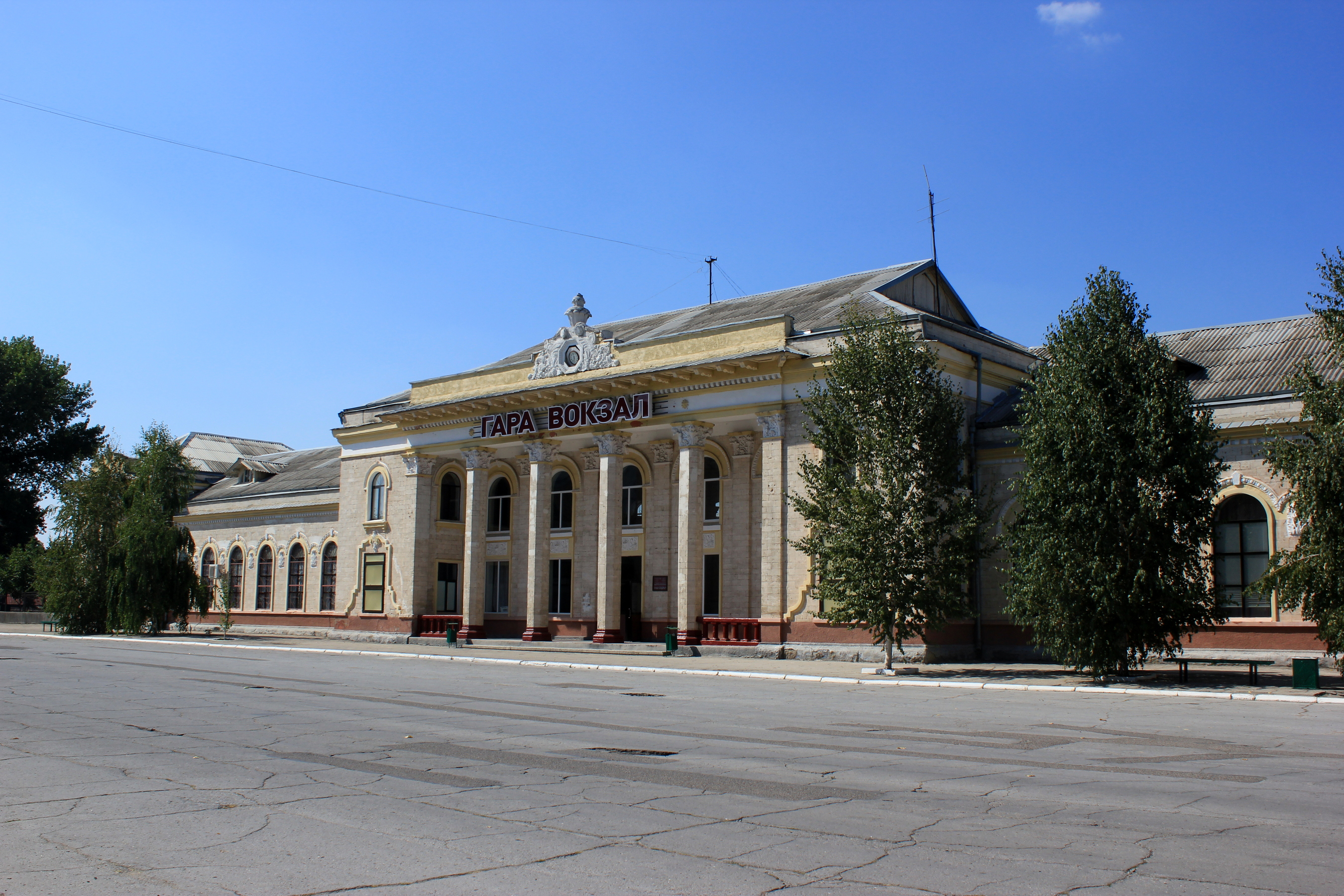 вокзал станції Бендери-1 у місті Бендери, середньє Подністров'я на Поділлі.